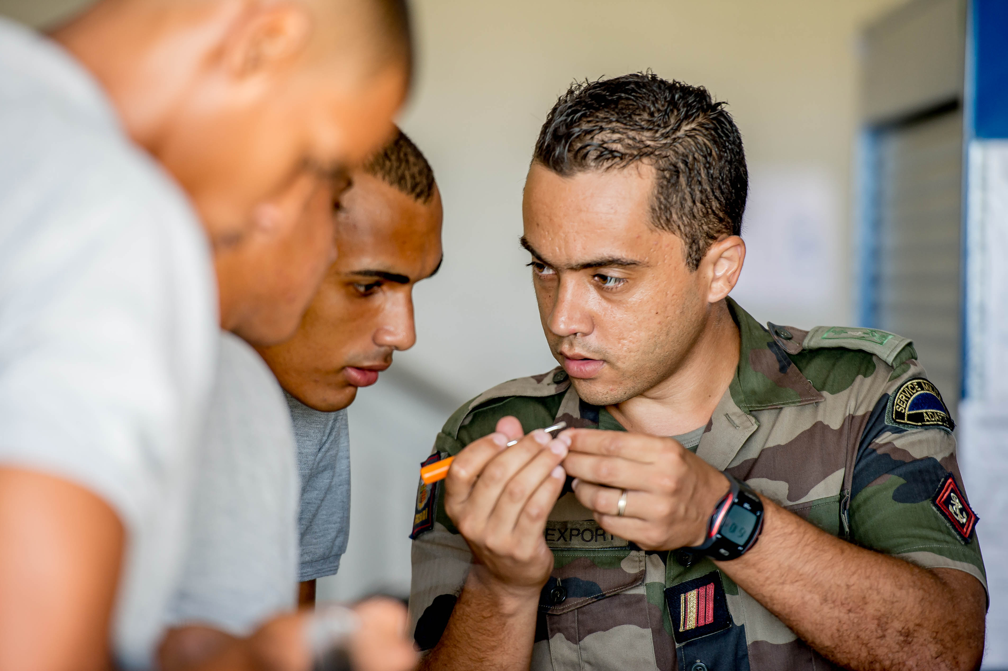 Une des clés de la réussite du SMA et de ses bénéficiaires réside dans l'apprentissage du bon geste et l'écoute du formateur.